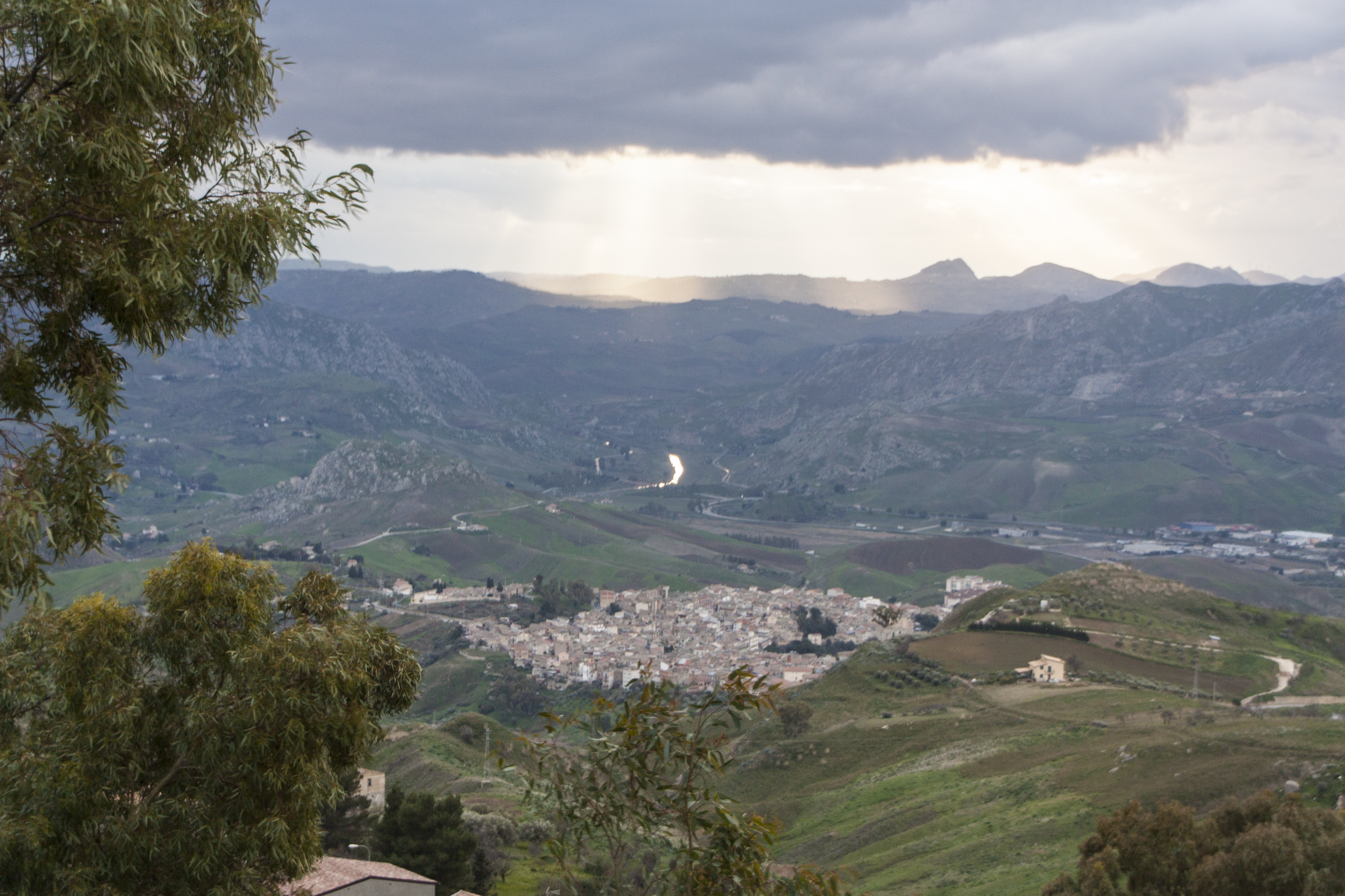 Campofranco e il fiume Platani da Sutera